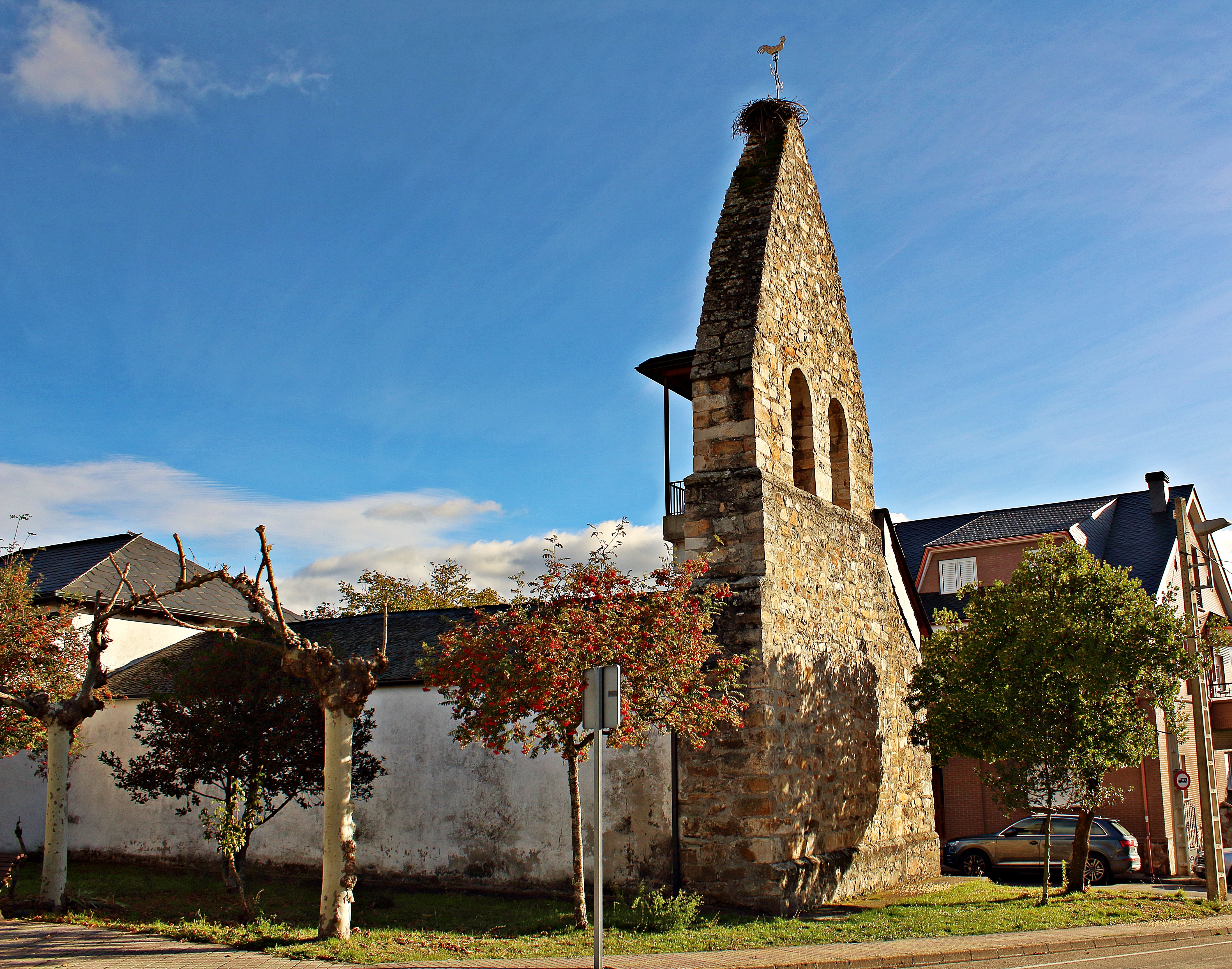 Ocero, localidad de Sancedo, comarca de El Bierzo, provincia de León.